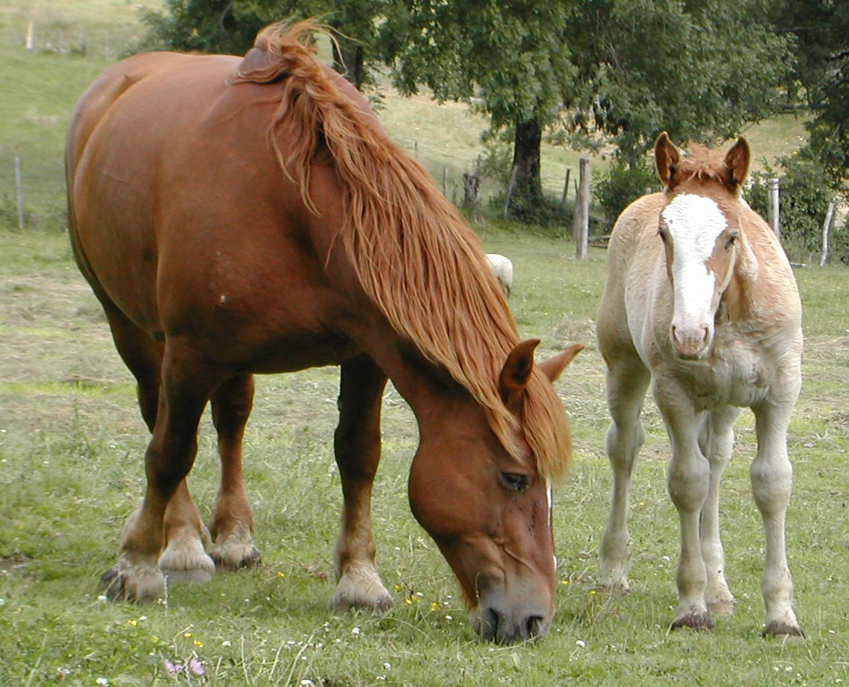 Un poulain et sa mère (qui broute) ...